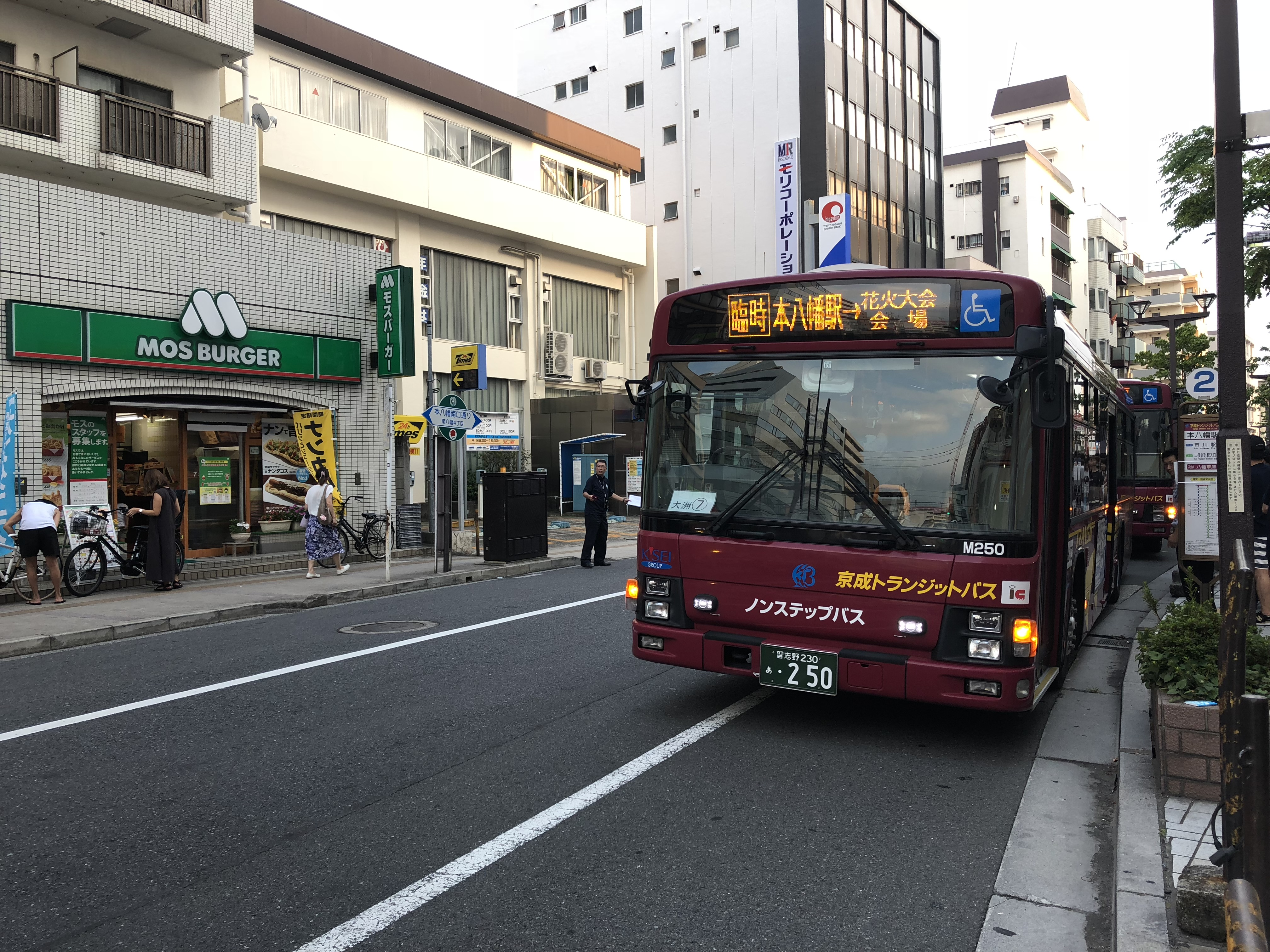 2018年8月4日に撮影。